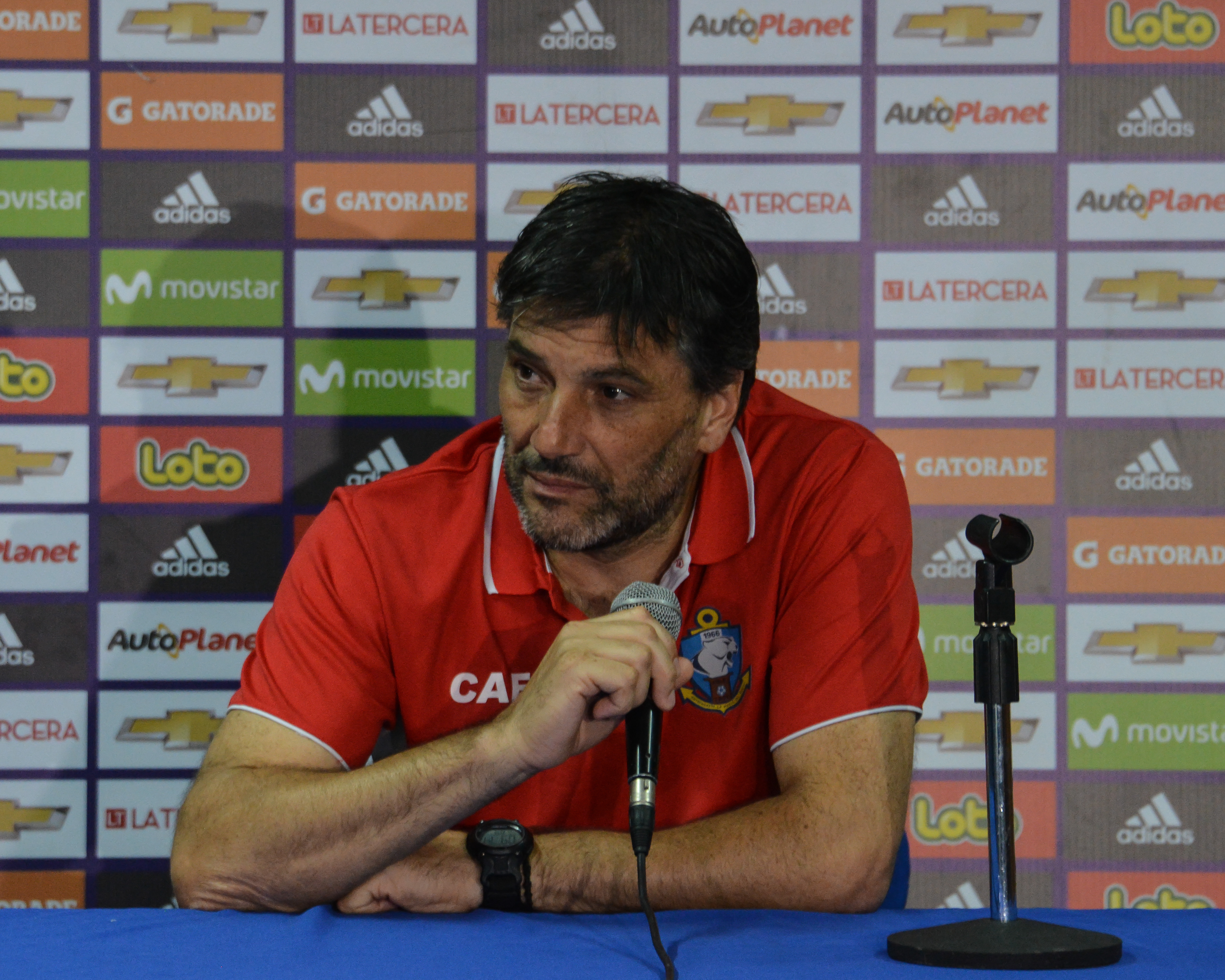 Gerardo Ameli, Universidad de Chile v Deportes Antofagasta, Estadio Nacional, Santiago, Chile.